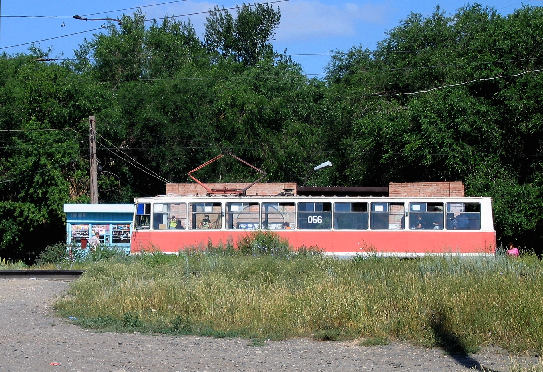 Новотроицкий трамвай, Оренбургская область